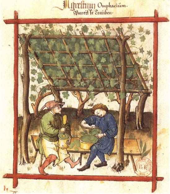 Grünernte von Weintrauben. Aus dem Handbuch der Familie Corutti in Verona um 1375